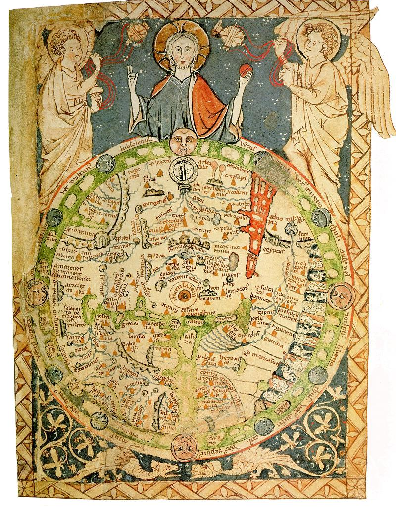 Psalterio de Londres, mappamundi inglés onde se representan as nacións coñecidas. Século XII.